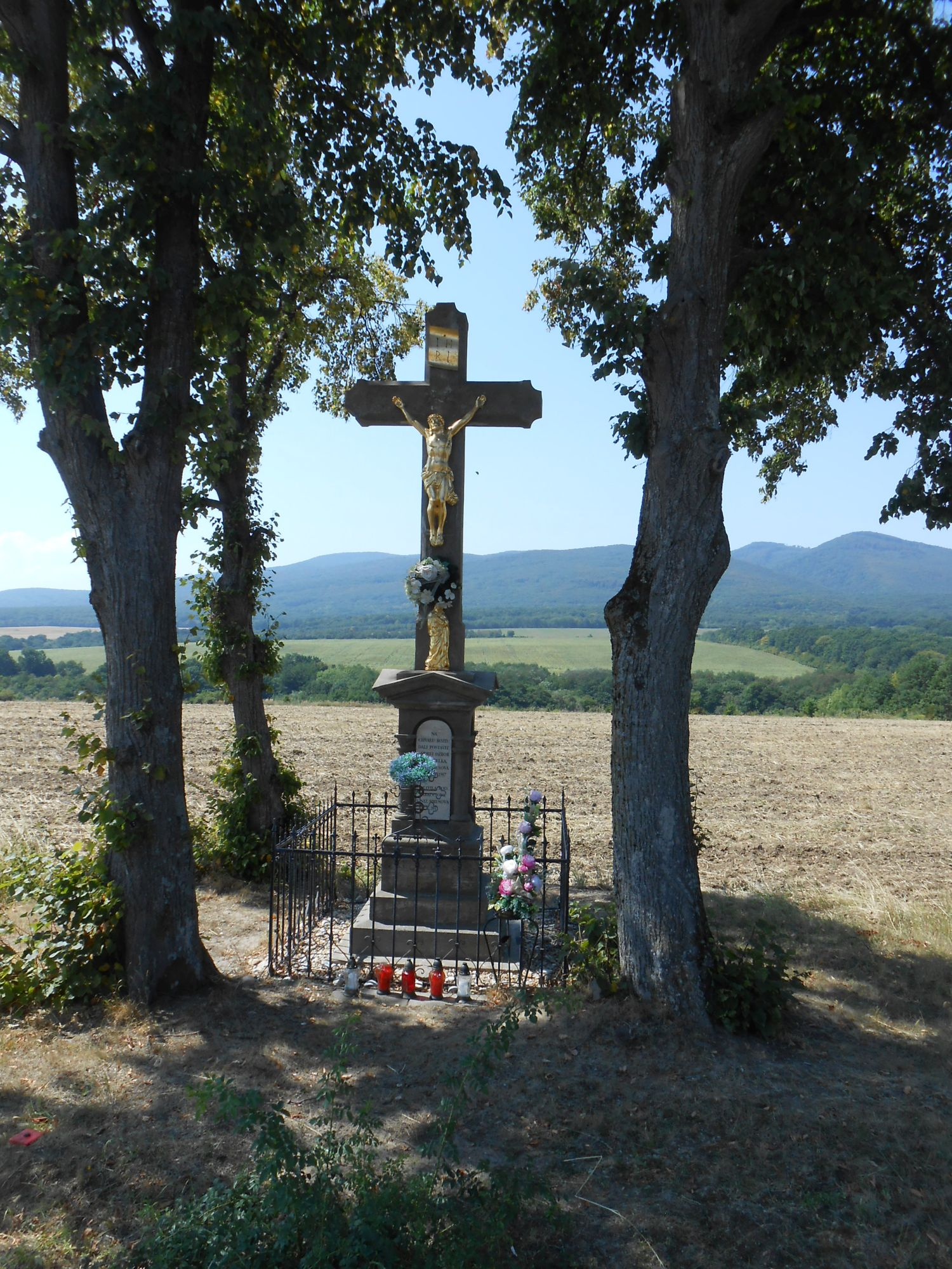 Kríž pri ceste I/19 medzi Sečovcami a Dargovom